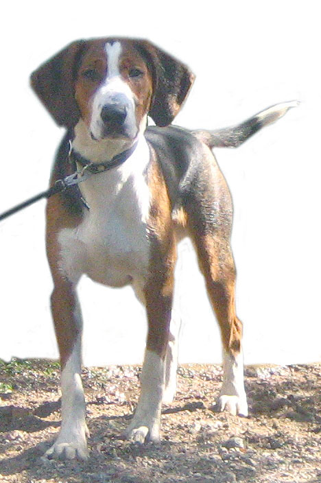 Nuori suomenajokoira, 9kk vanhana oleva uros